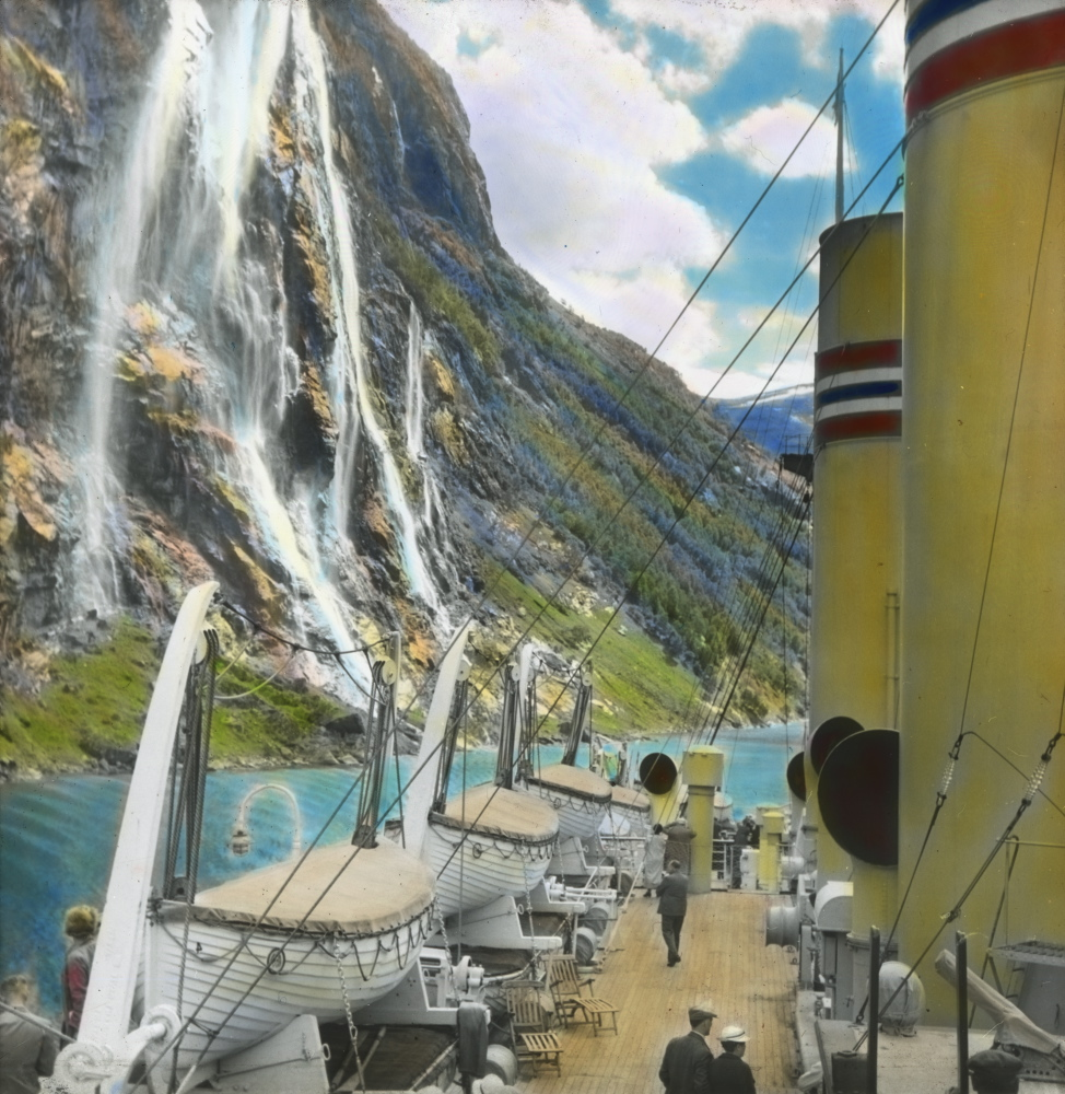 Håndkolorert dias. Kvinner og menn spaserer på dekket til et turistskip i Geirangerfjorden. På dekket henger livbåter og et par fluktstoler står oppsatt. I bakgrunnen sees fossefallet "De syv søstrene", også kalt Knivsflåfossen.